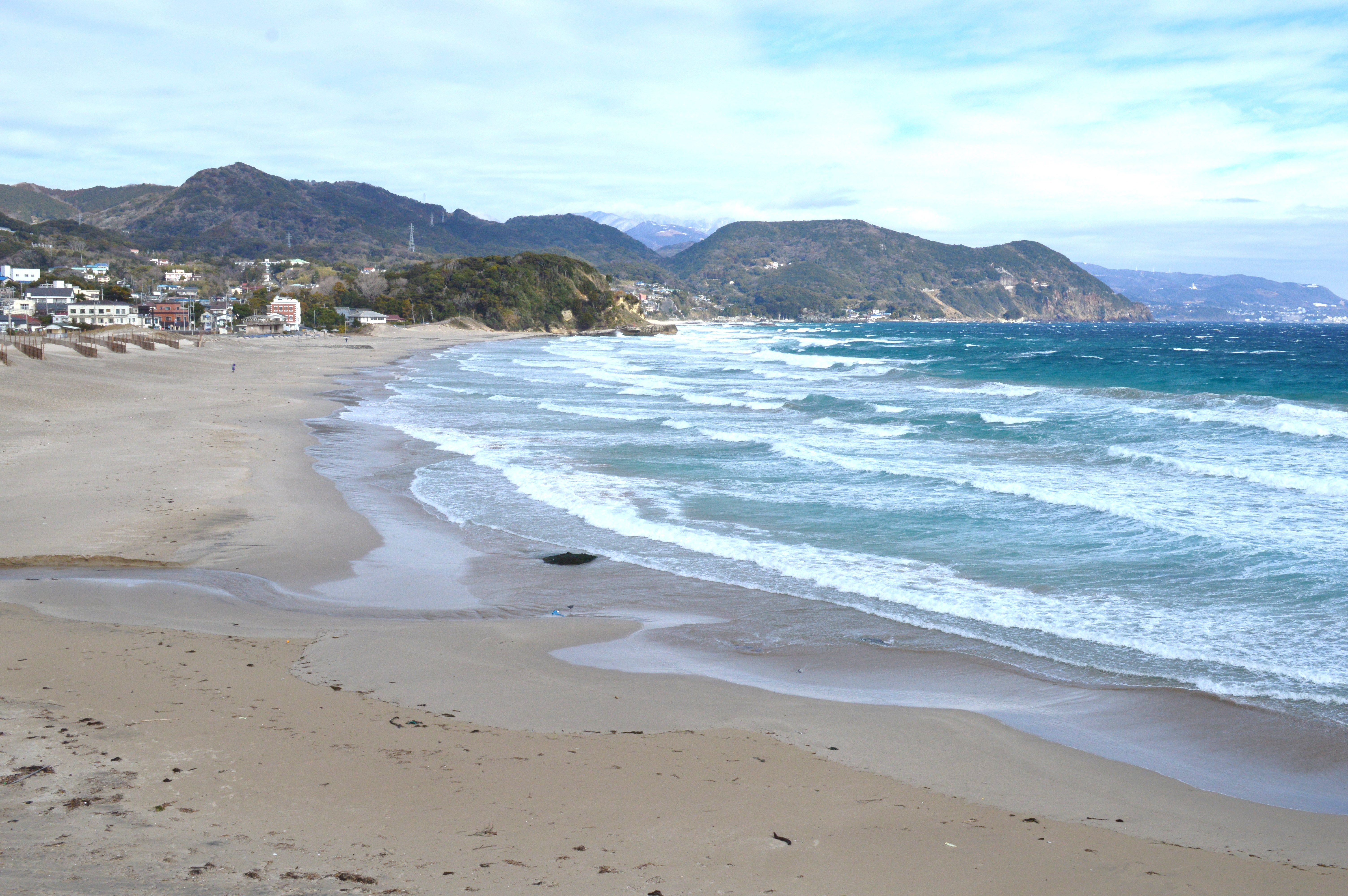 白浜海岸 (静岡県伊豆市)